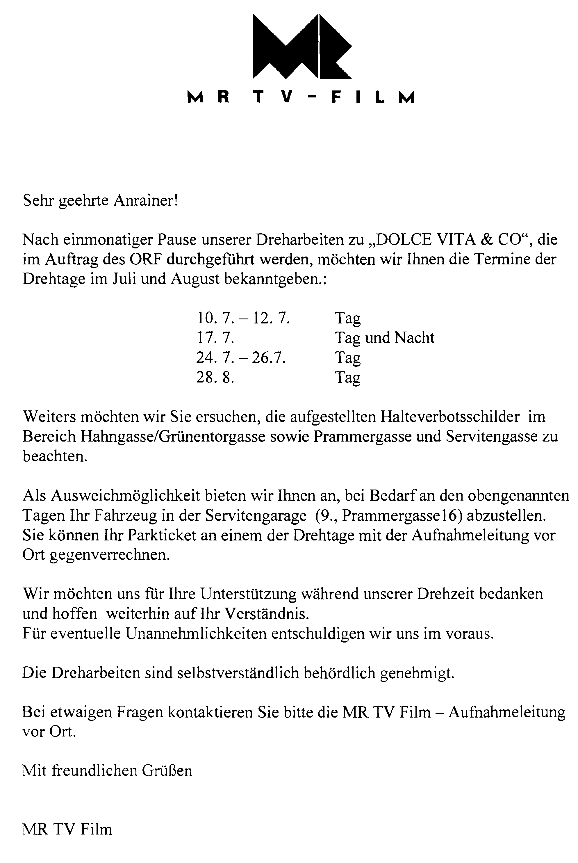 Wien-Alsergrund, Servitenviertel, Straßenanschlag im Sommer 2000 aus Anlass der Wiederaufnahme von TV-Filmaufnahmen zur Serie Dolce Vita & Co